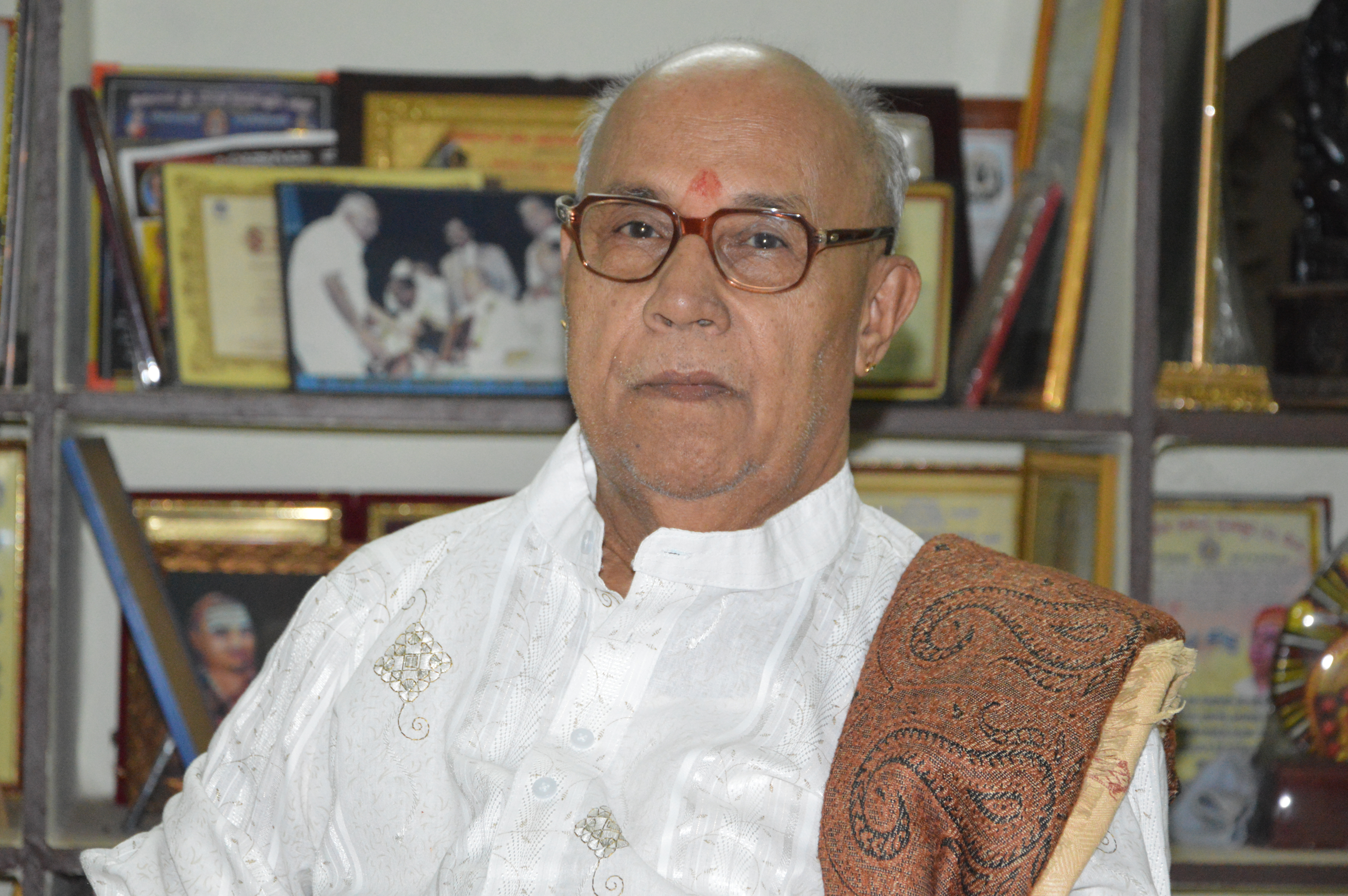 Yakshagana Song Singer